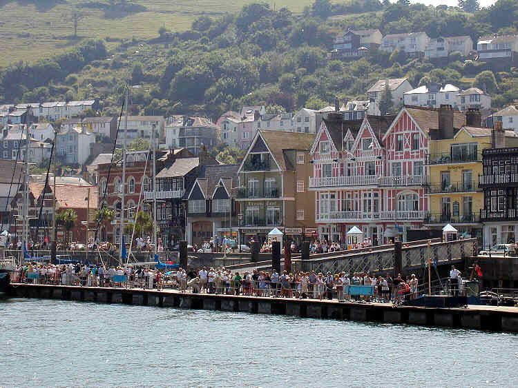 Dartmouth (Devon) - general view